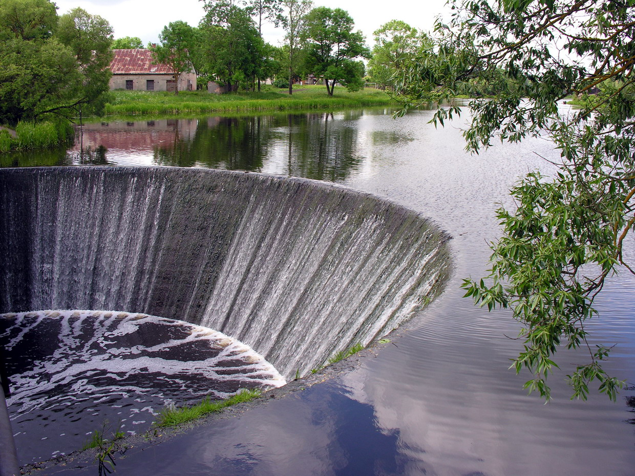 Žagarės regioninis parkas: Švėtė Žagarėje